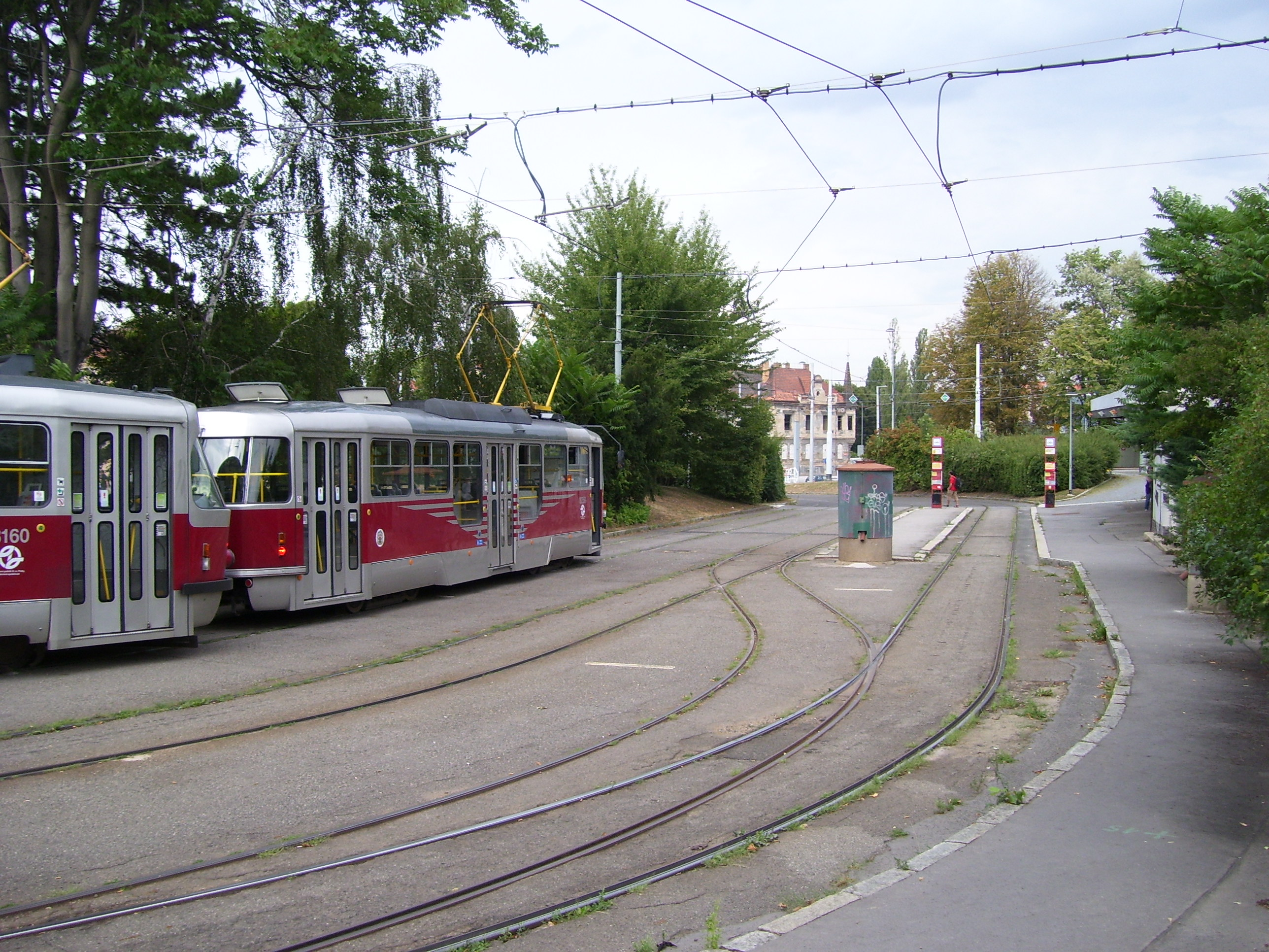 Praha, tramvajová smyčka Špejchar, nástupní zastávka